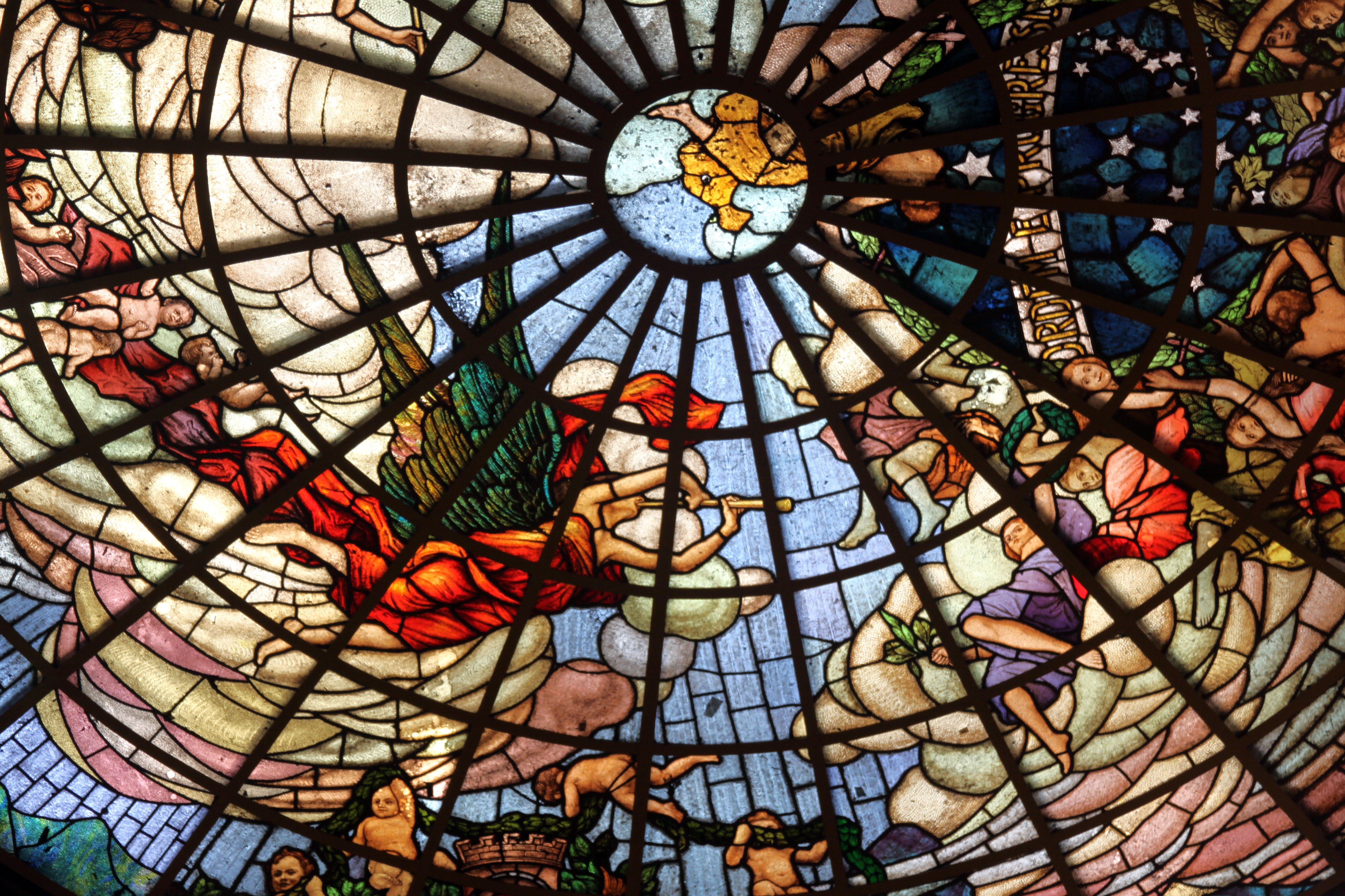 Detalhe do vitral circular executado pela Casa Conrado, de São Paulo, sobre cartão dos Irmãos Chambelland: Carlos (1884-1950) e Rodolfo (1879-1967) da Cúpula do Plenário.